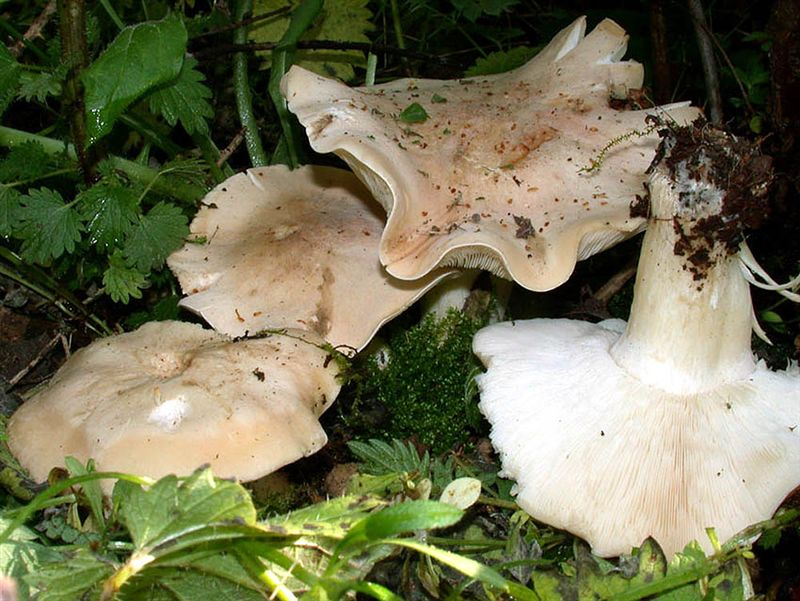 Champignon comestible Nom français : Tricholome de la Saint Georges Nom latin : Calocybe gambosa Photo : Jean-Jacques Wuilbaut Lieu : Mons (Belgique) Date : 21 avril 2002